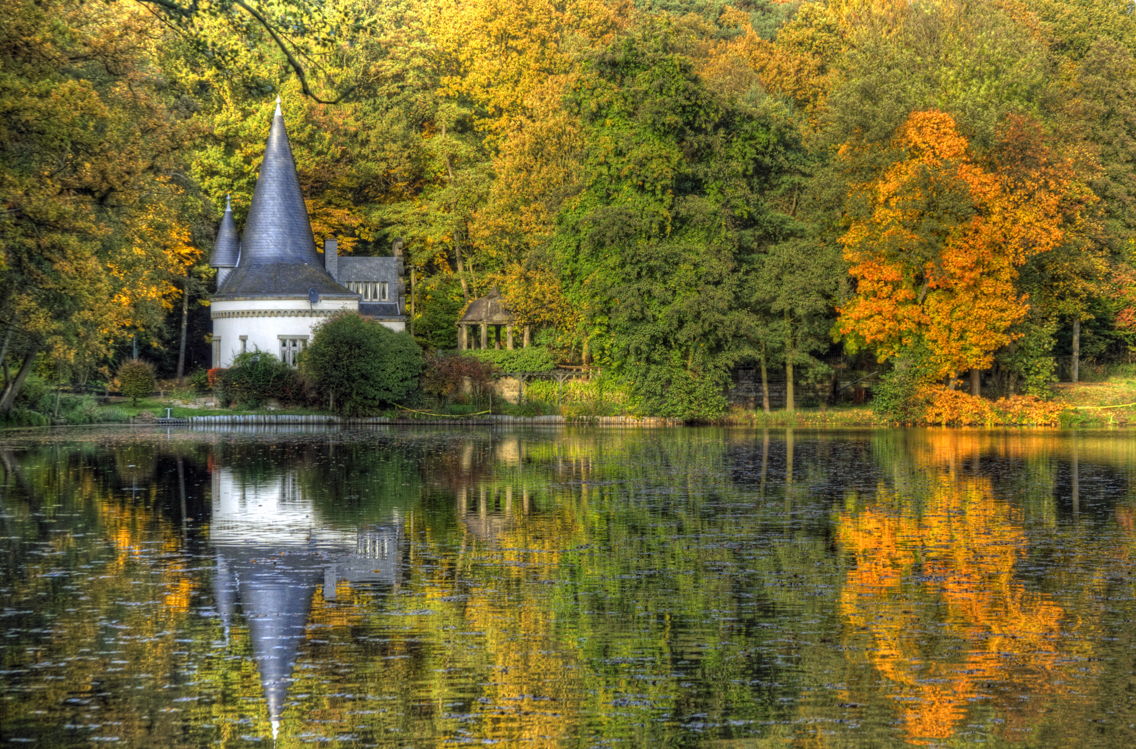 Raky-Weiher in Dalheim, Germany